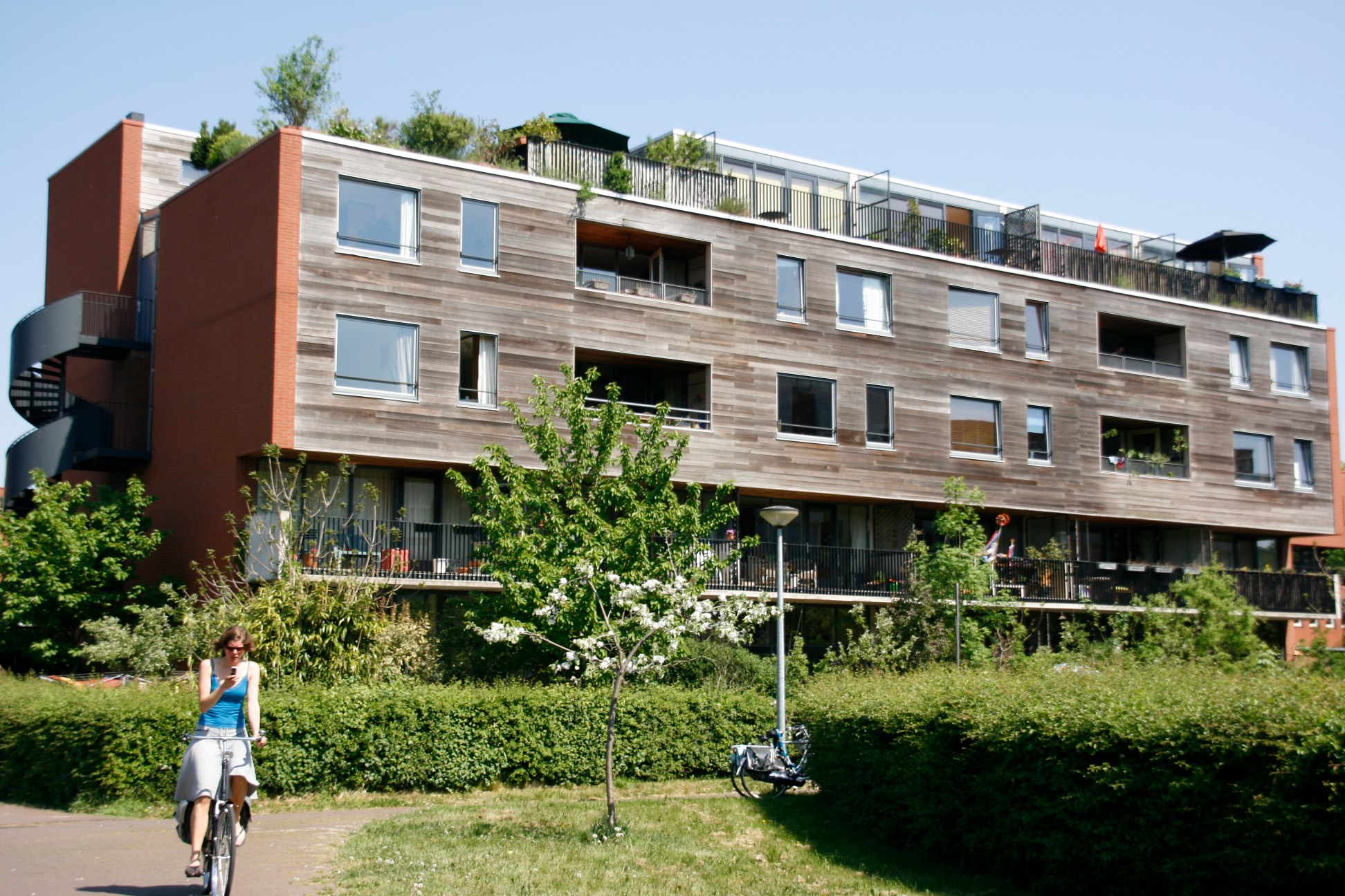 quartier nouveau à Amsterdam